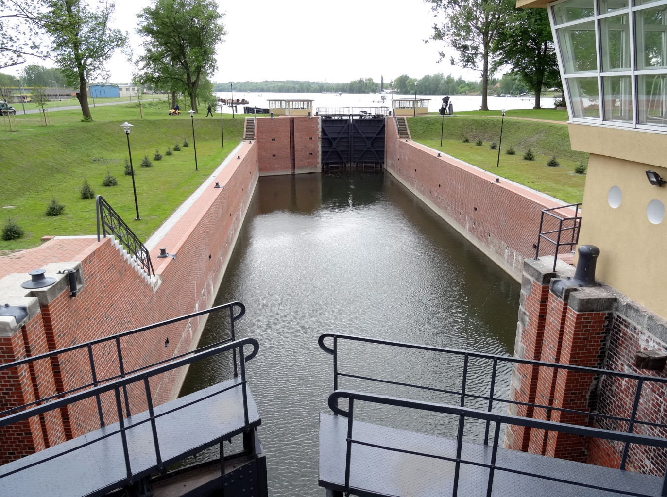 Śluza Brdyujście (1879) w Bydgoszczy